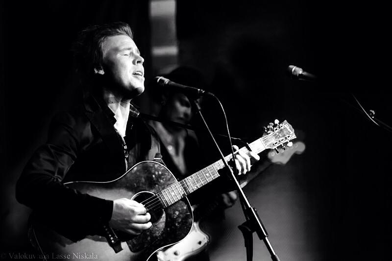 Tommi Kalenius esiintymässä Musiikkiteatteri Kapsäkissä huhtikuussa 2015.